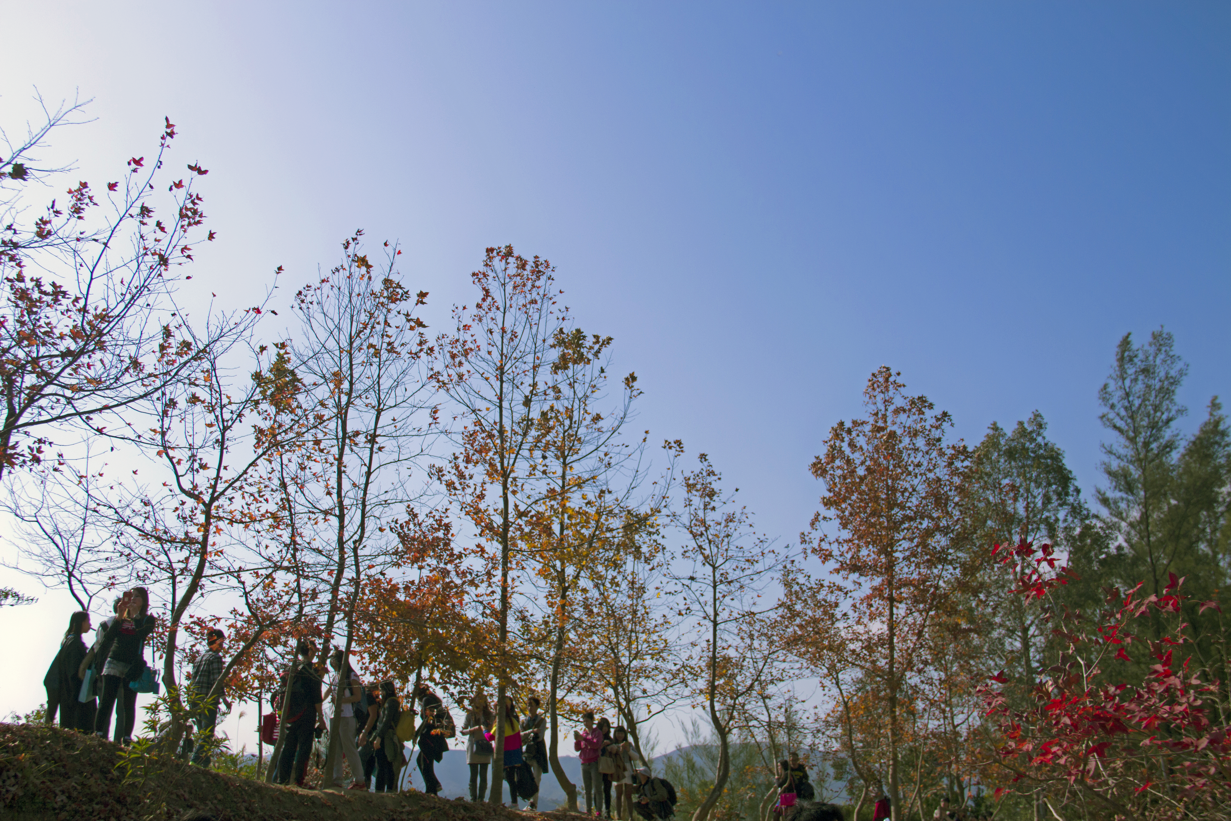 Tai Tong Autumn Leaves